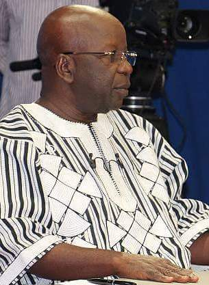 Simon Compaoré, à la RTB pendant l'émission dialogue citoyen du 30 juin 2016